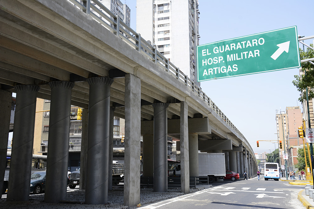 Elevado Av San Martin